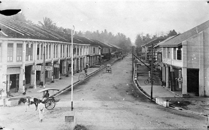 Repronegatief. Hoofdstraat te Kisaran, Sumara's Oostkust, Asahan